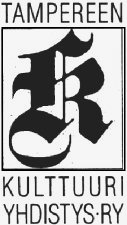 Tampereen kulttuuriyhdistyksen logo